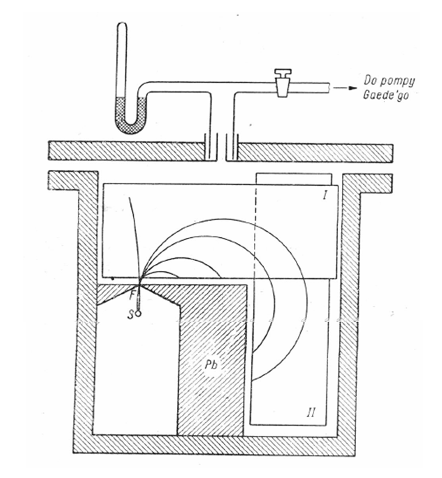 Schemat spektrometru Jana Kazimierza Danysza (1911)